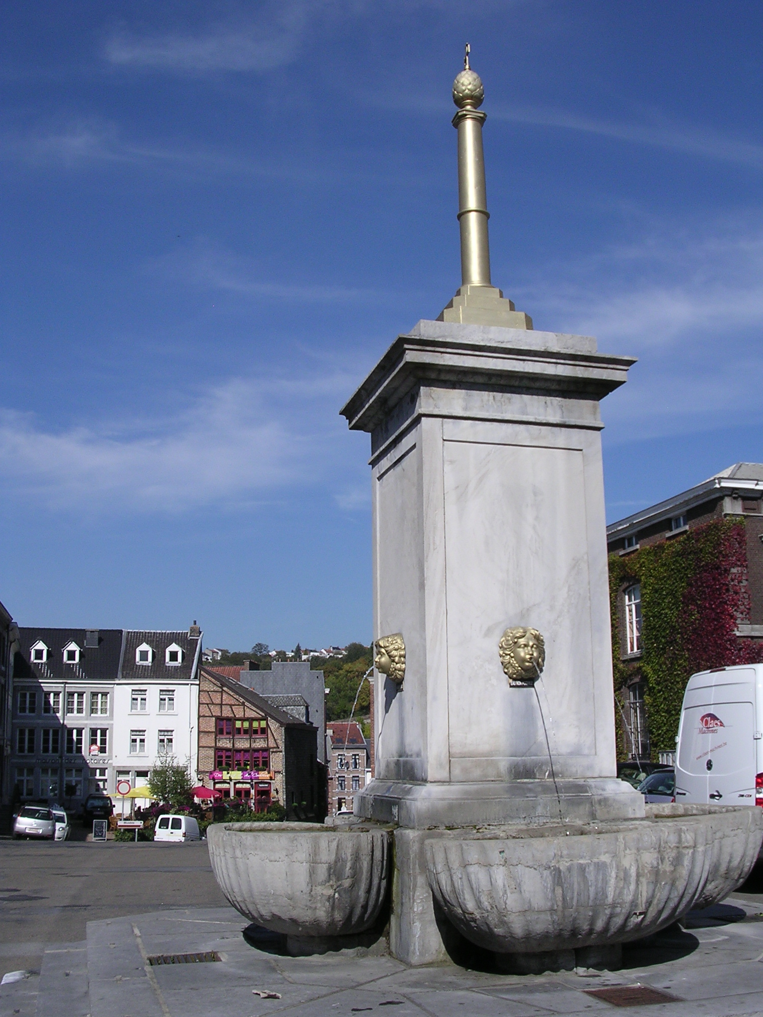 Fontaine monumentale du Perron, Place du Marché